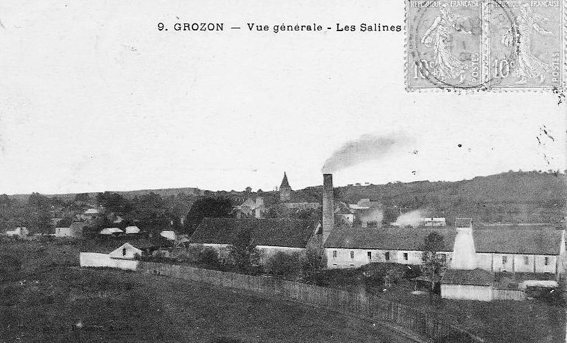 Vue générale de la saline de Grozon.